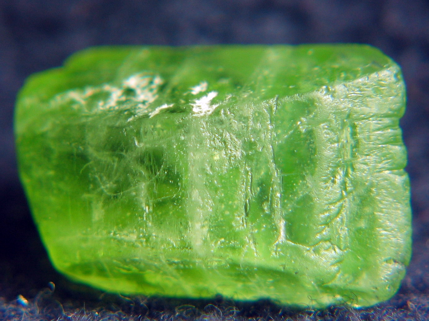 Chryzolit, peridot, oliwin z Kohestanu w Pakistanie